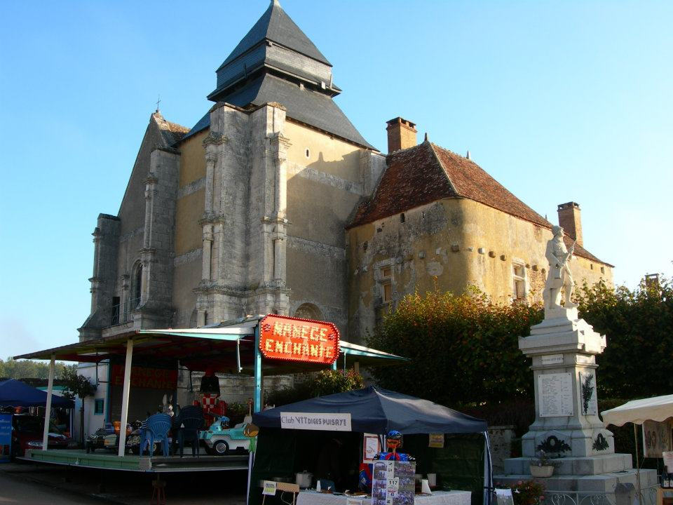 Diges, la foire aux châtaignes. Rue des Sources au pied de l'église fortifiée ; vue du sud-ouest. Le monument aux morts, visible ici sur la droite de la photo, se trouve au début de la route de l'Ocre (hors de la photo, sur la gauche).